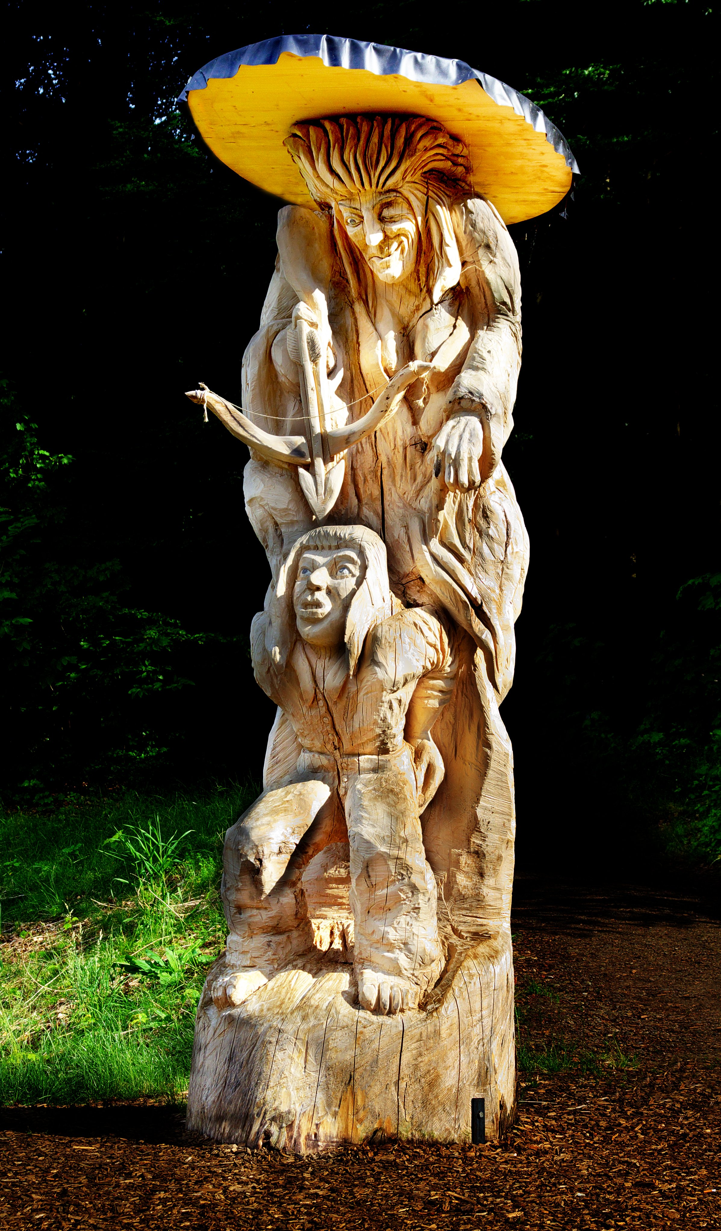 Hexenschuss Eine Skulptur aus einem 120 Jahre alten Lindenbaum WaldMenschen von Thomas Rees ein ständige Ausstellung auf dem Skulpturenpfad des Waldhaus Freiburg